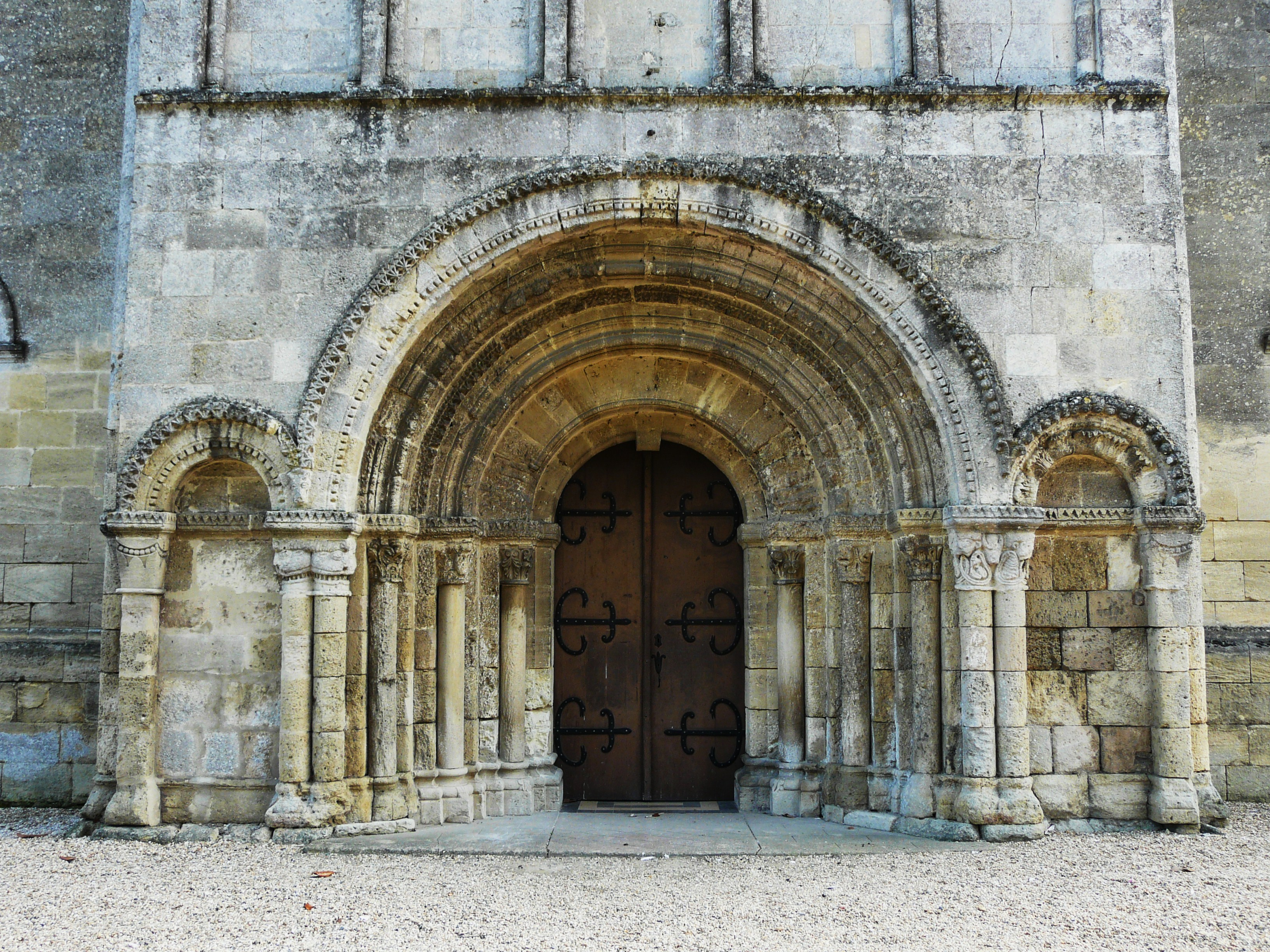 Portail roman de l'église Saint-Martin, Izon, Gironde, France .